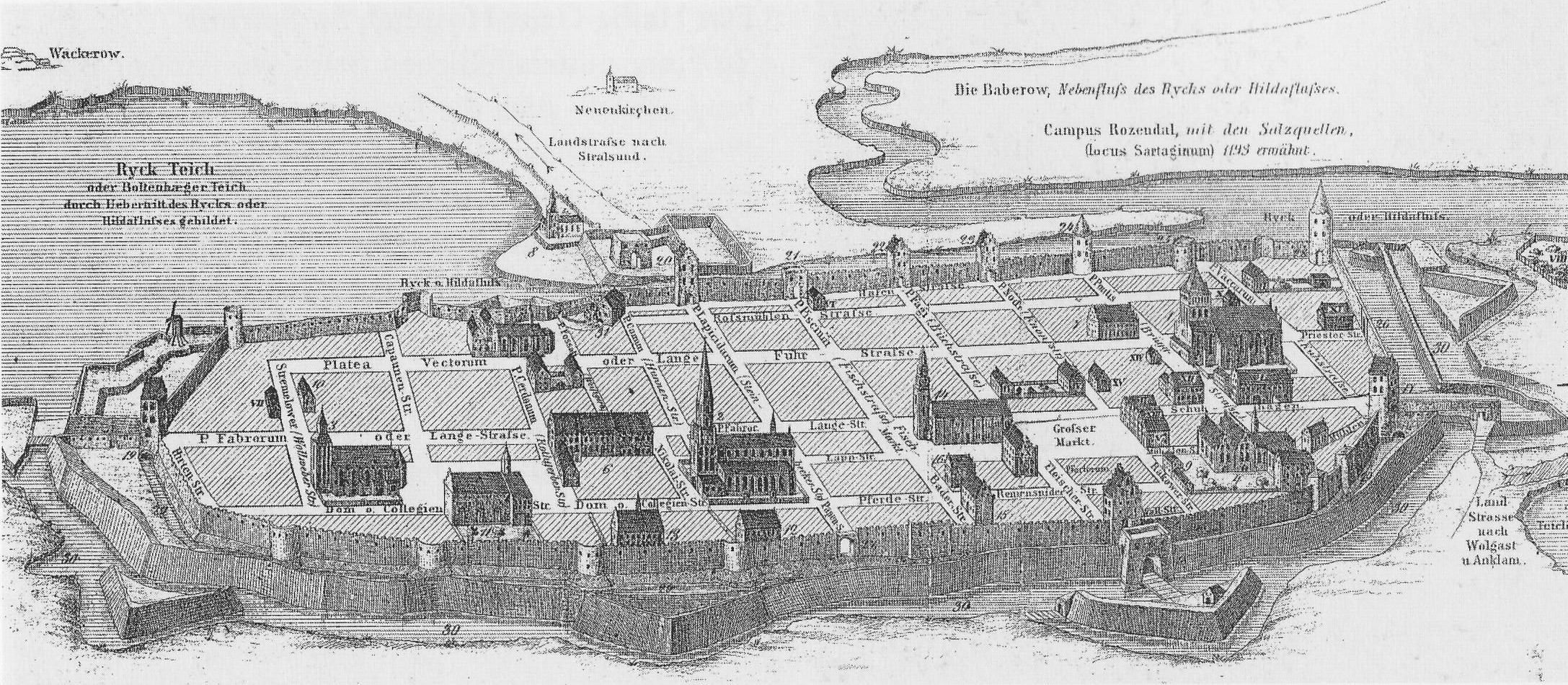 Greifswald im Mittelalter (Rekonstruktion von Theodor Pyl nach historischen Texten und Grafiken)